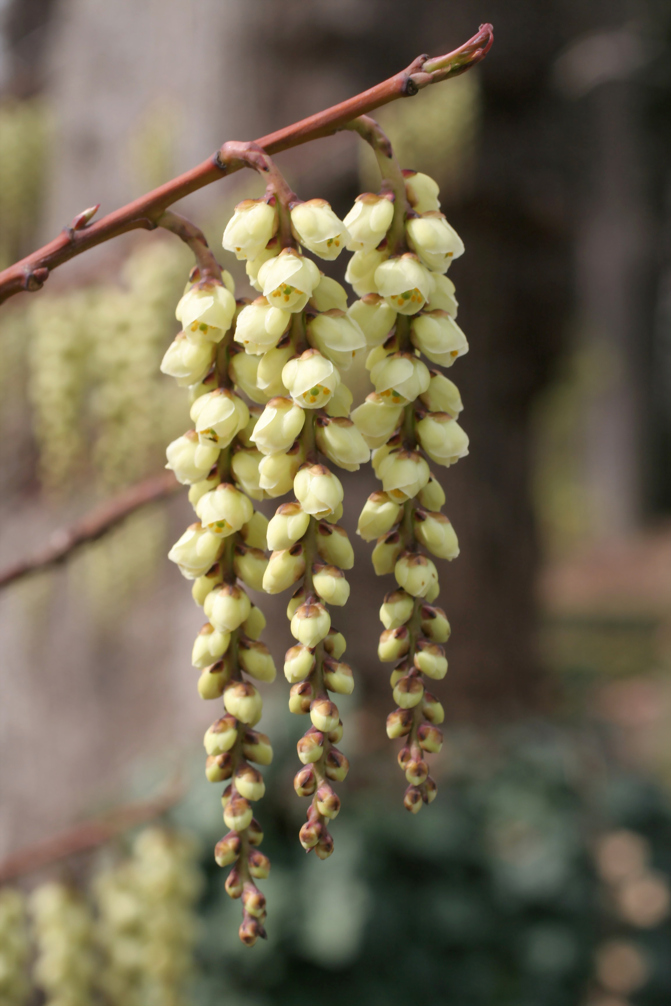 Stachyurus praecox. Real Jardín Botánico, Madrid